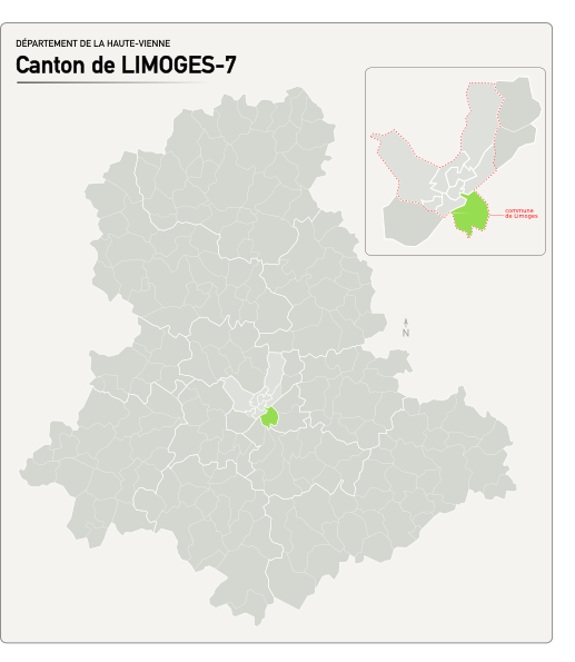 Carte du nouveau canton de Limoges-7.